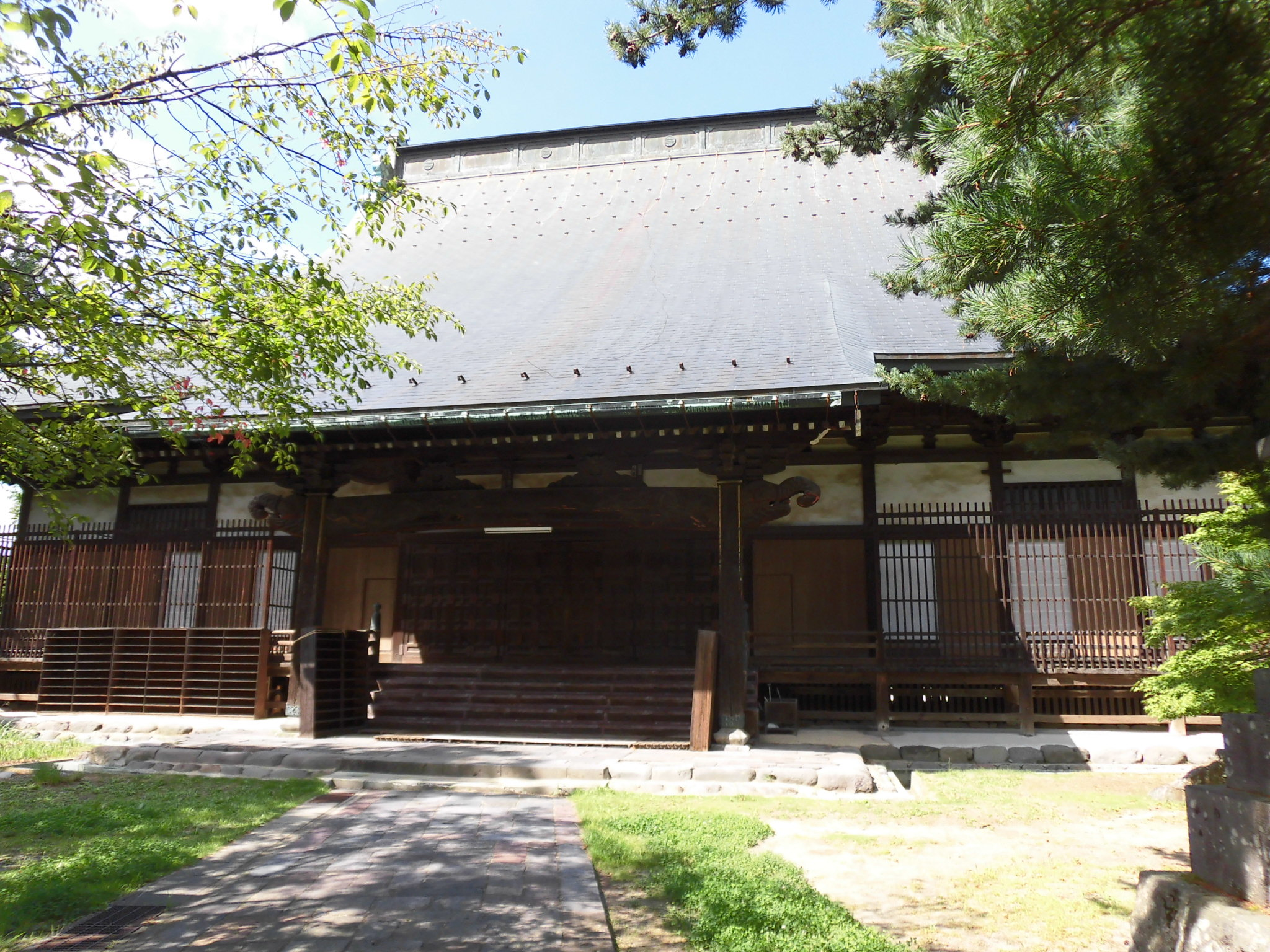 最上山専称寺（せんしょうじ）の本堂。山形県山形市緑町に所在。浄土真宗大谷派。 1483年（文明15年）創建。最上義光が豊臣秀次に連座して15歳で処刑された娘の駒姫の菩提を弔うために移転、拡張。周囲は専称寺町と呼ばれた。